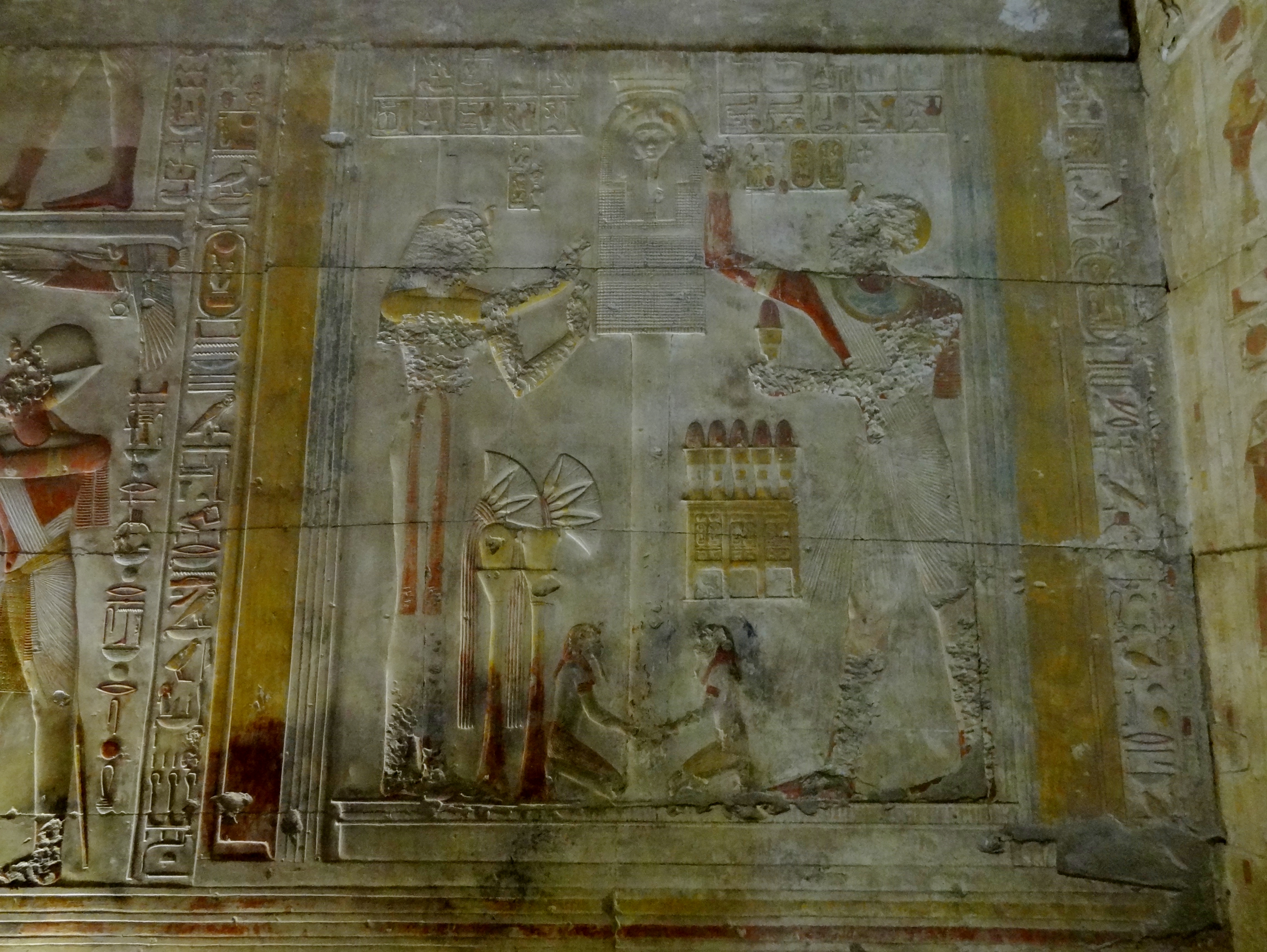 Südwestwand in der ersten Halle des Osiris-Komplexes im Totentempel des Sethos I. von Abydos, Ägypten